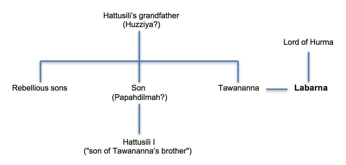 Slektstre for den hettittiske kongefamilien på Labarnas tid (etter Forlanini, 2010)